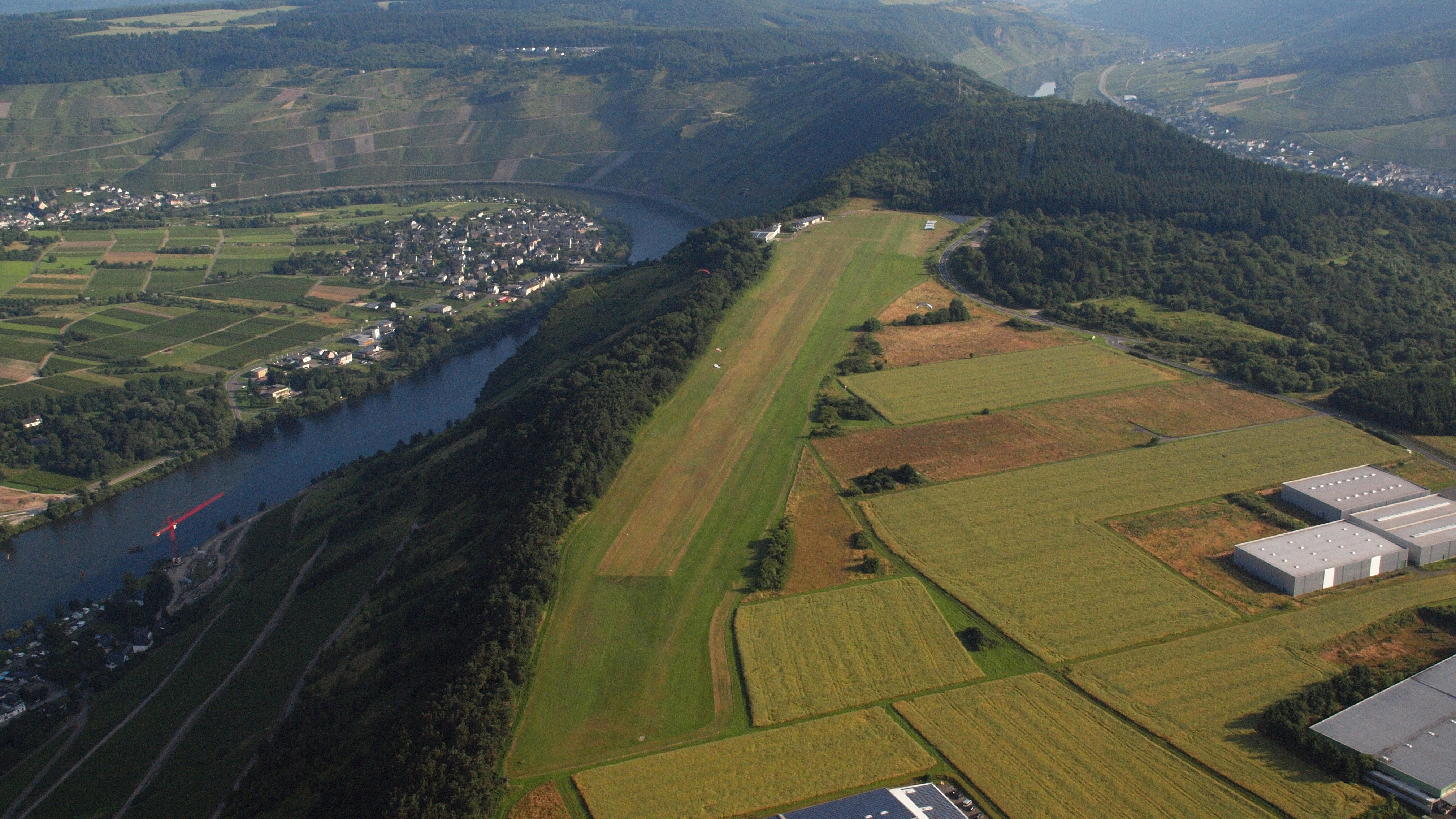 Flugplatz Traben-Trarbach/Mont Royal: Luftaufnahme